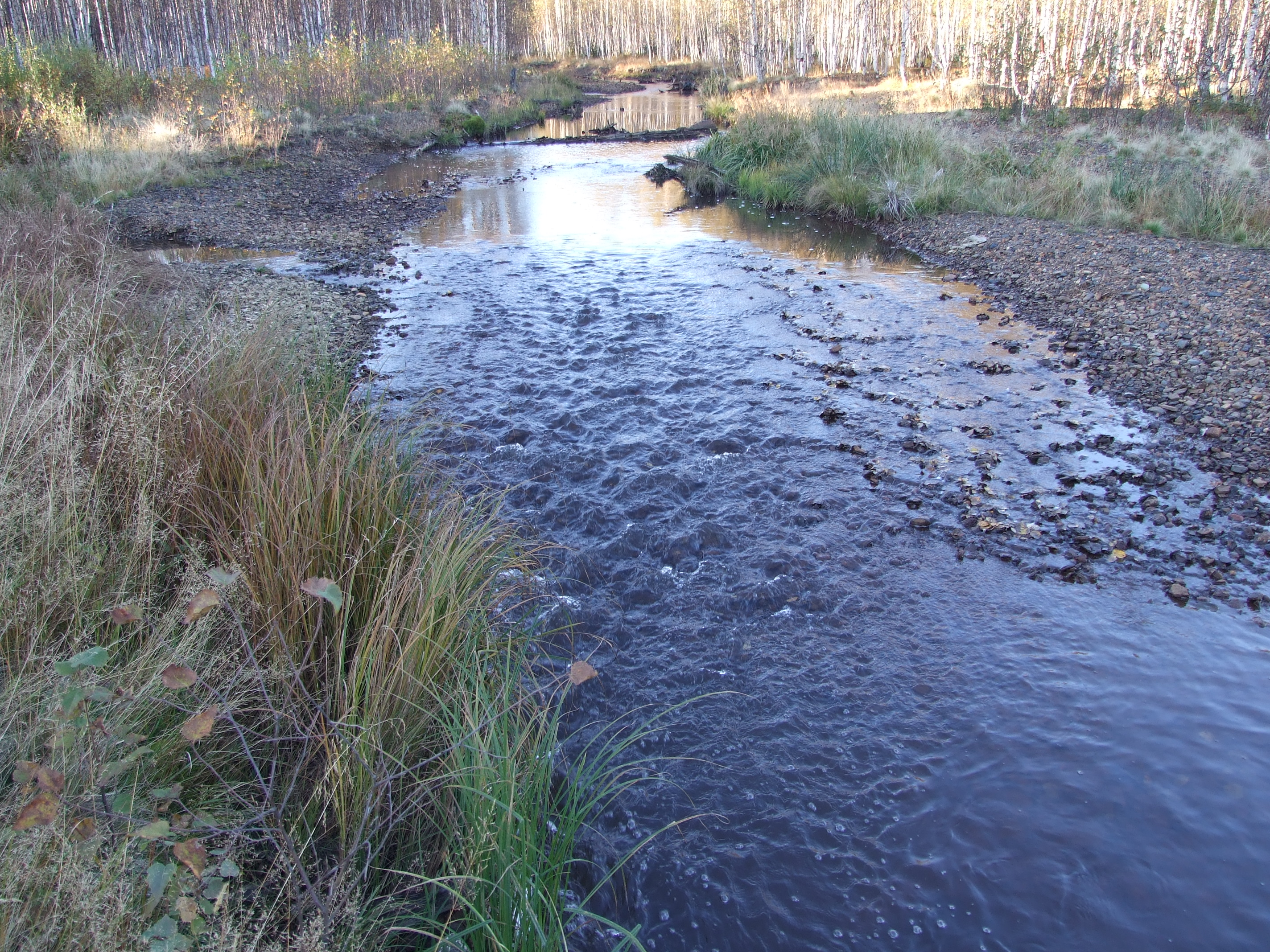 Река в Пермском крае.Река на момент 2007 года.